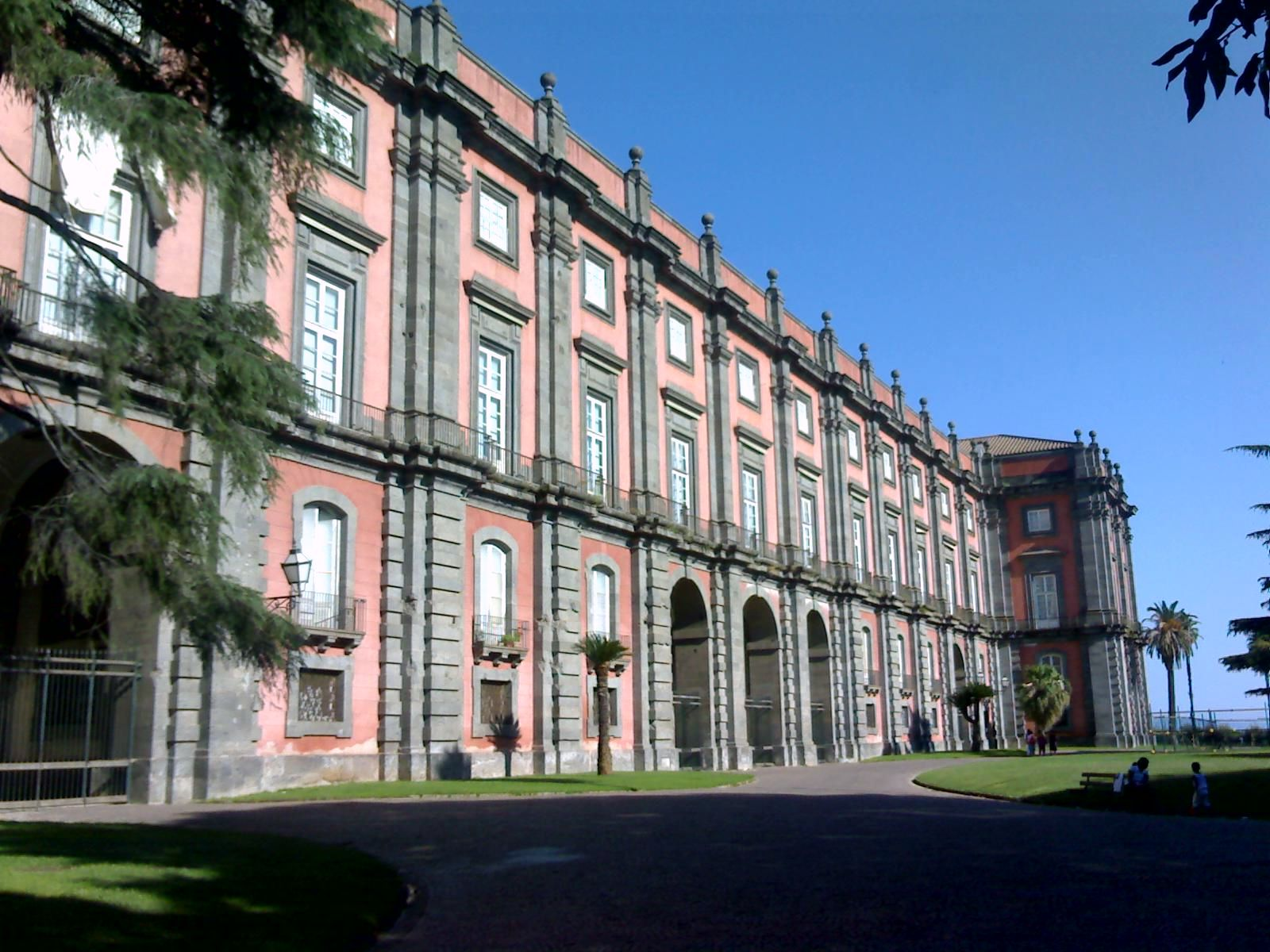 Facciata posteriore della Reggia di Capodimonte (Napoli)